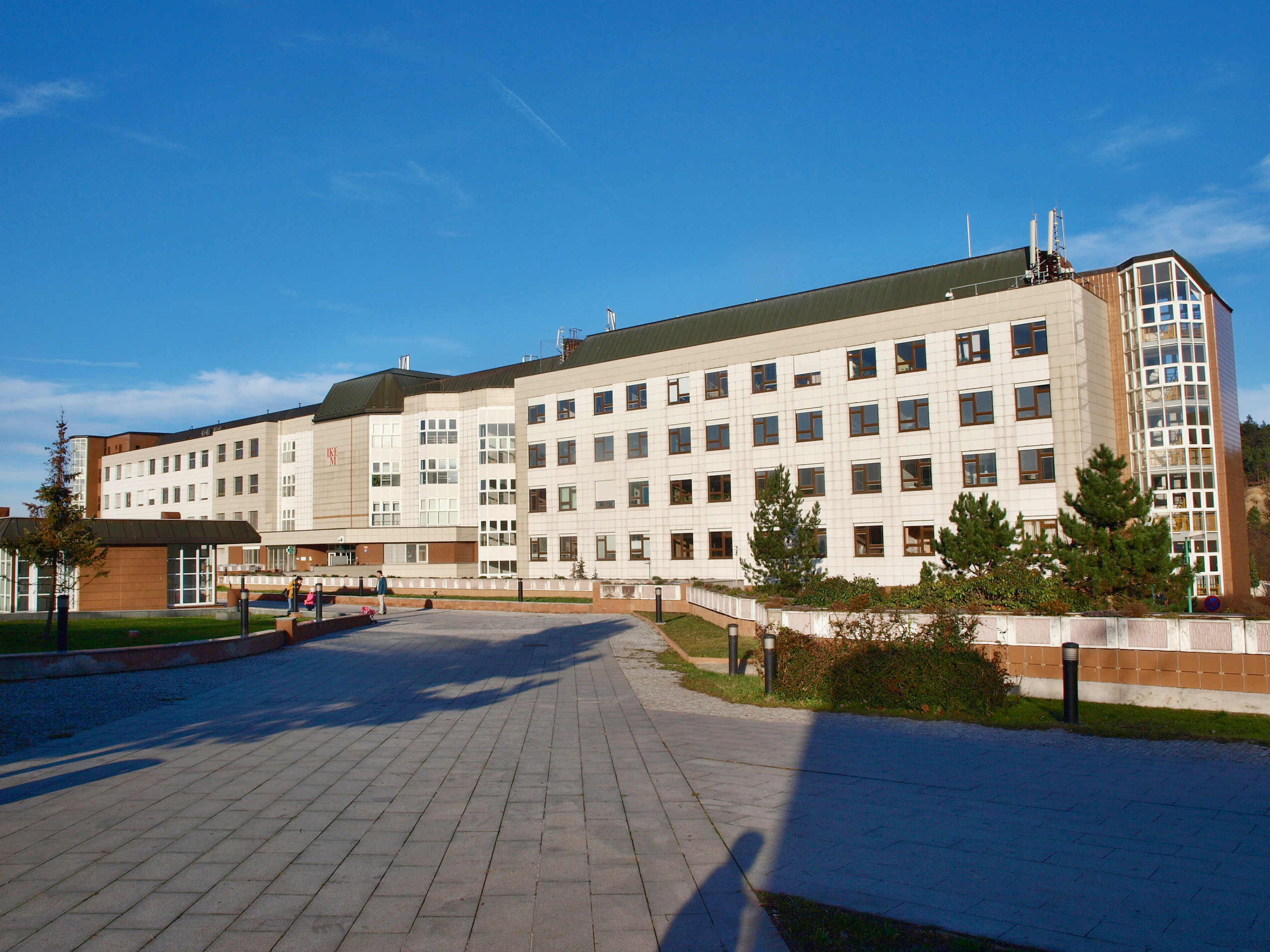 IKEM, Praha 4-Krč